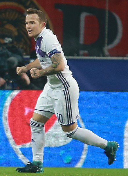 Dino Hotić, Jasmin Mešanović